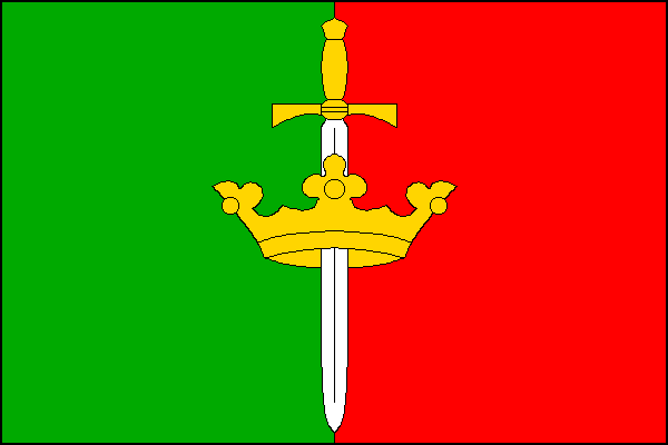 vlajka, Vranovská Ves, okres Znojmo